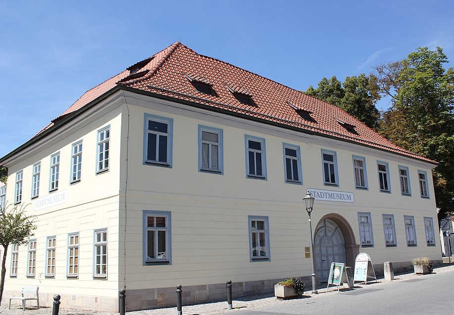 Außenansicht Stadtmuseum Hildburghausen